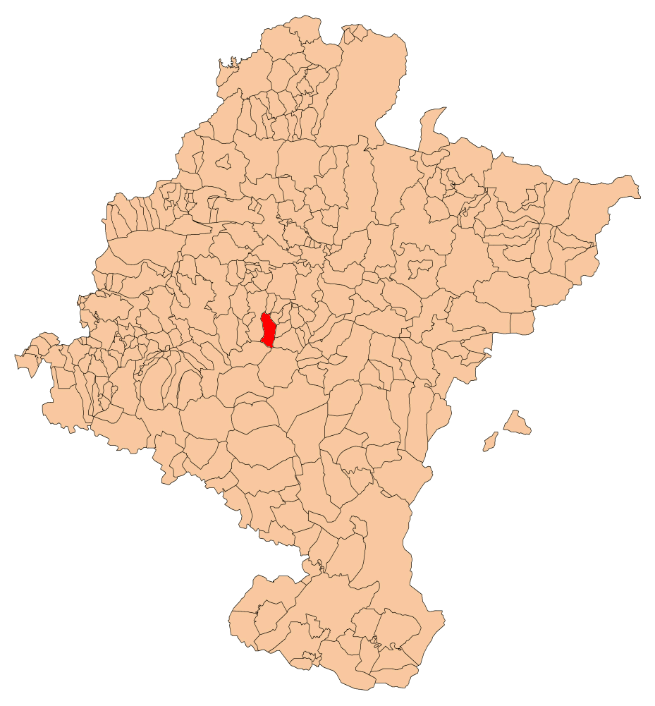 Obanos Nafarroako mapan kokatua.